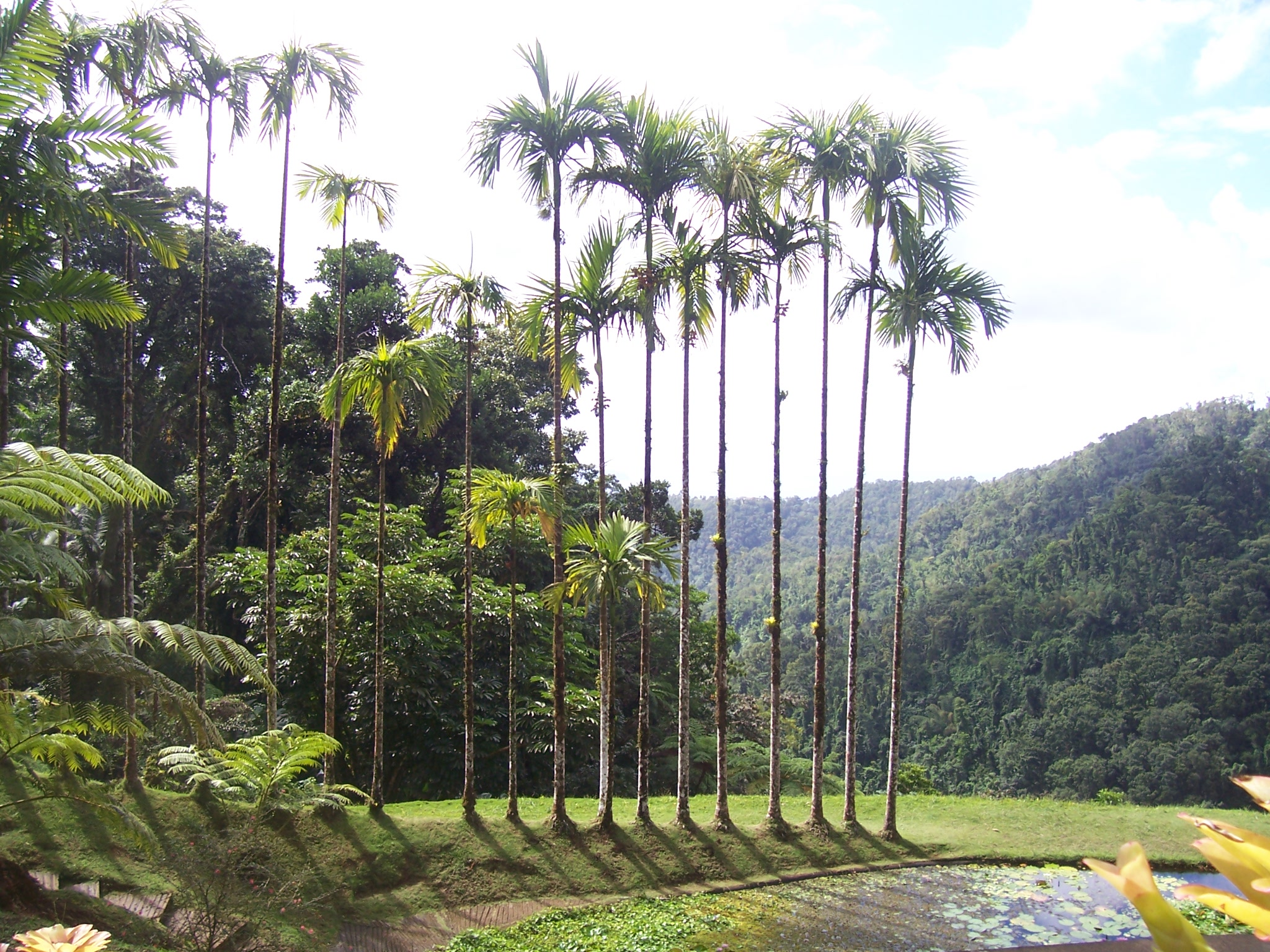 Jardin de Balata